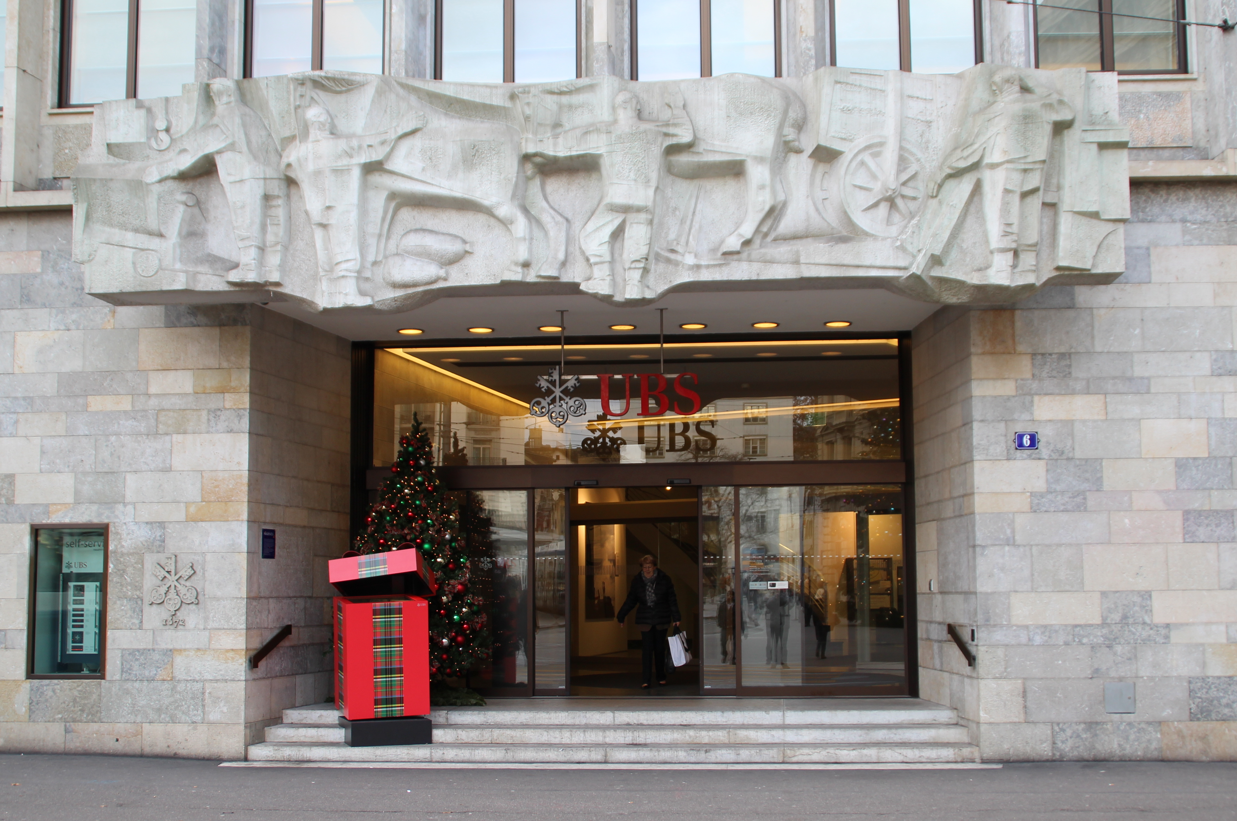 Eingang zur UBS am Zürcher Paradeplatz. Relief aus Solothurner Sandstein "Die Arbeit" von Franz Fischer